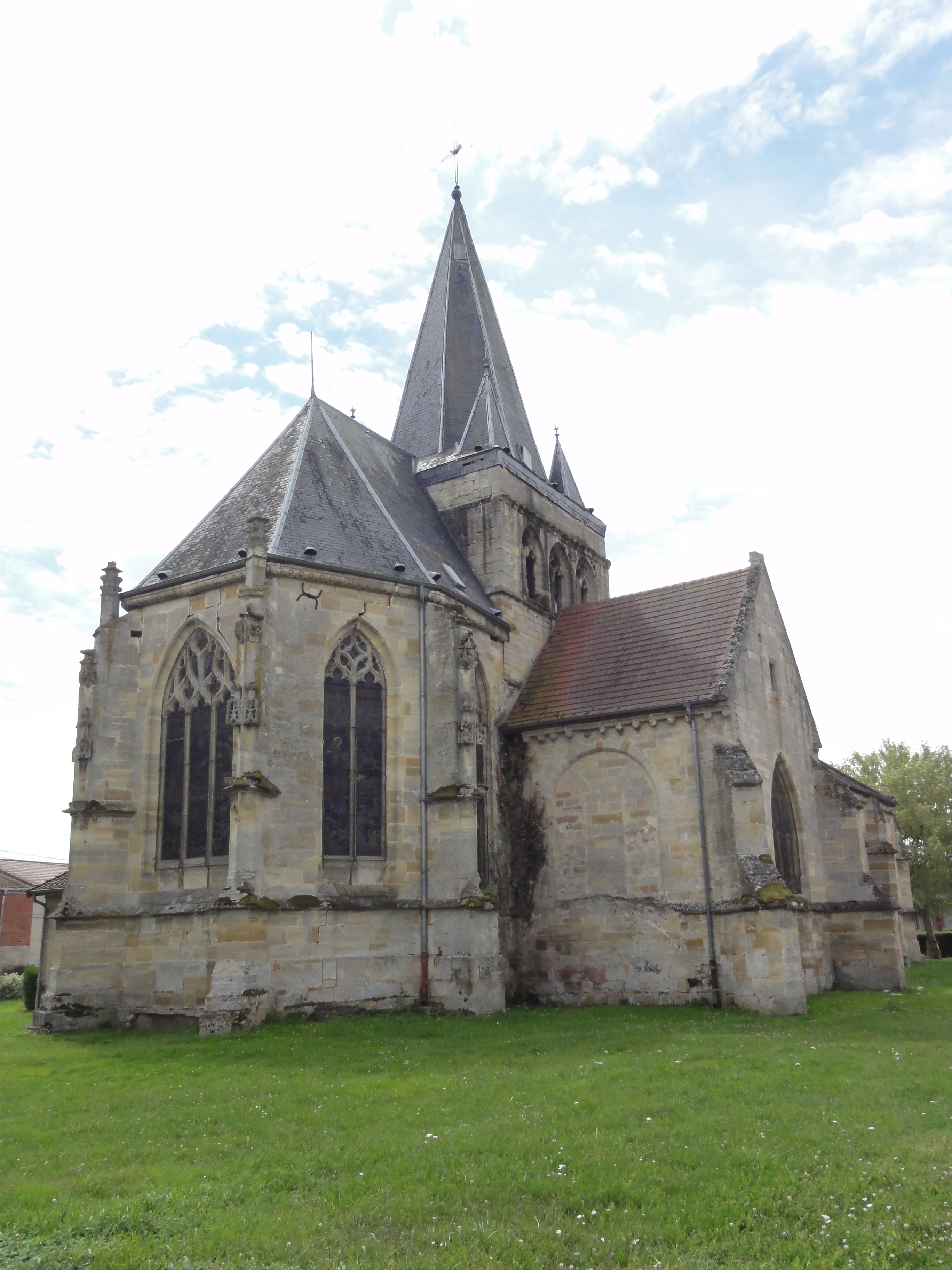 Église Saint-Médard de Rancourt-sur-Ornain .